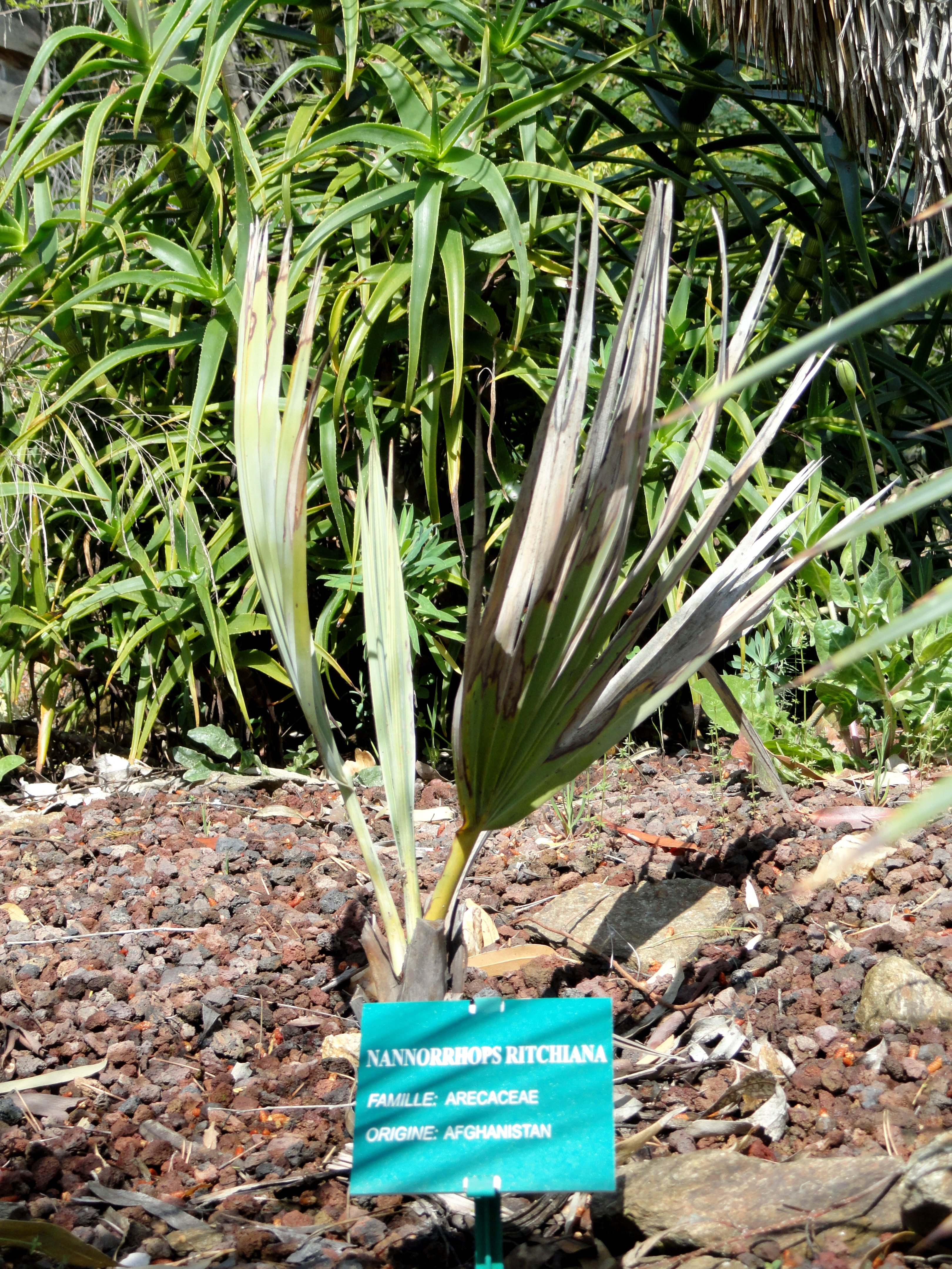 Nannorrhops ritchiana specimen in the Jardin d'oiseaux tropicaux, La Londe-les-Maures, France.